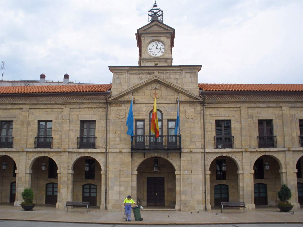 Town hall of Avilés (Asturias, Spain)